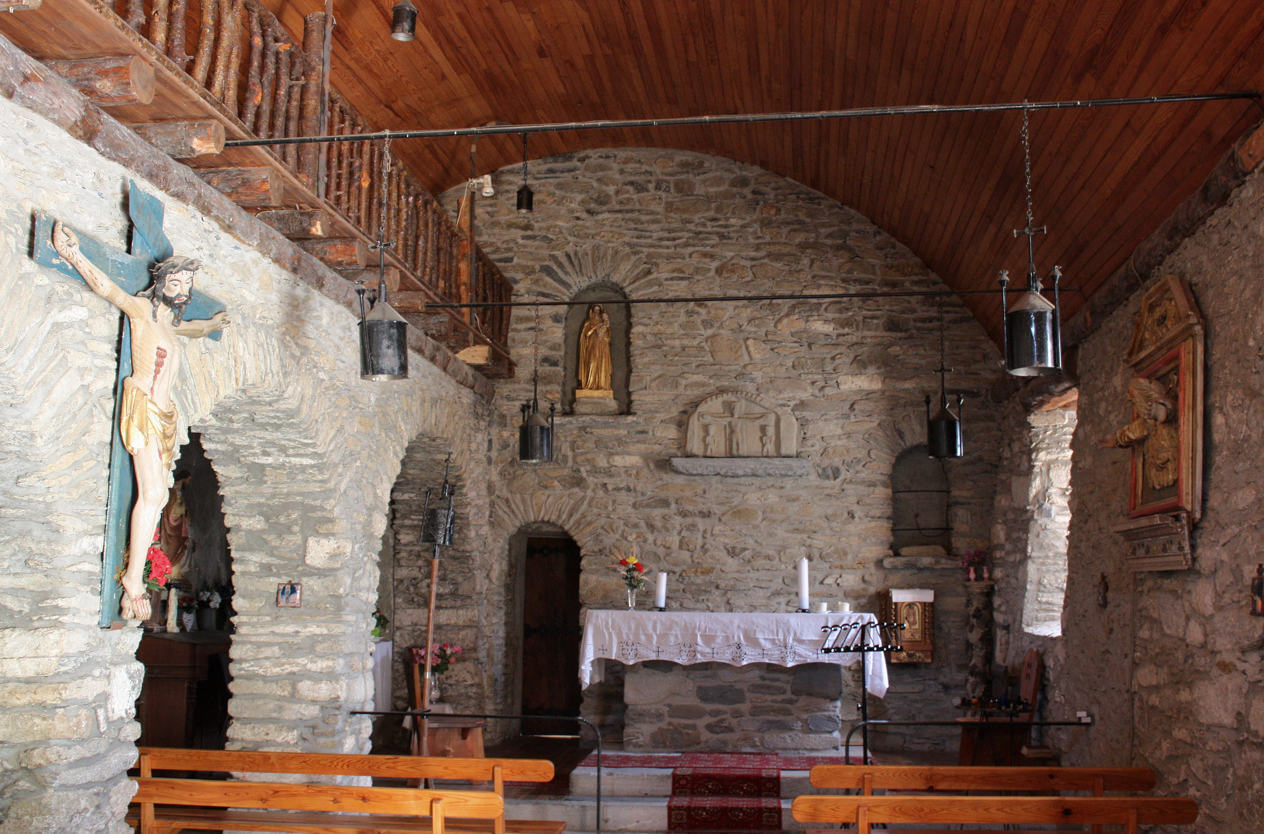 Gouaux-de-Larboust - Eglise Saint-Exupère